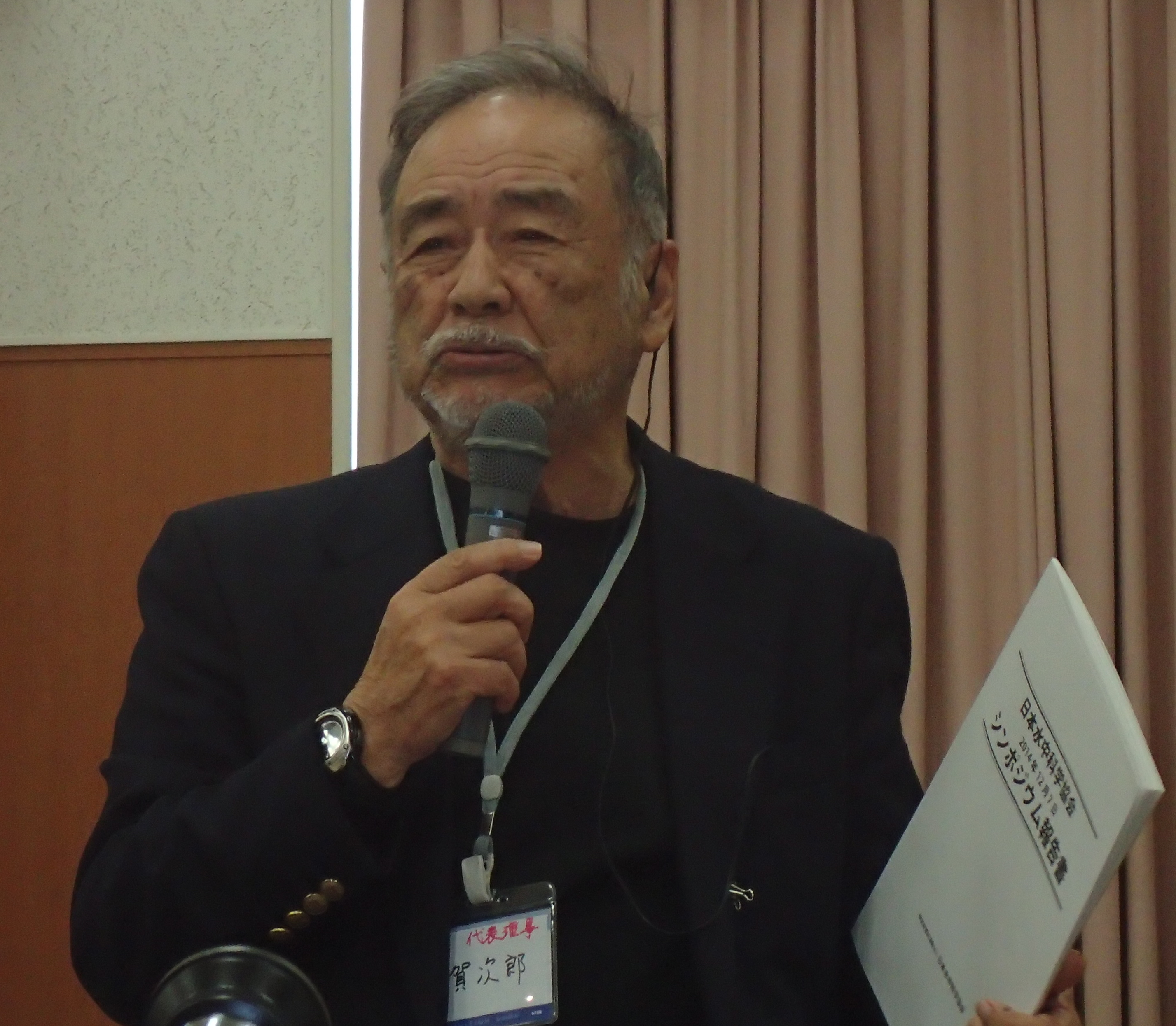 2014年12月7日 特定非営利法人 日本水中科学協会 JAUS 第４回シンポジウムの須賀次郎先生